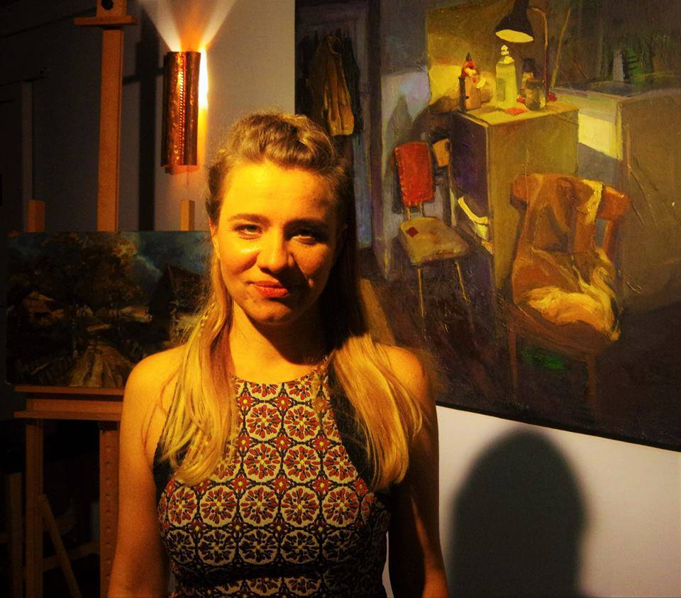 Katarzyna Kobylarz